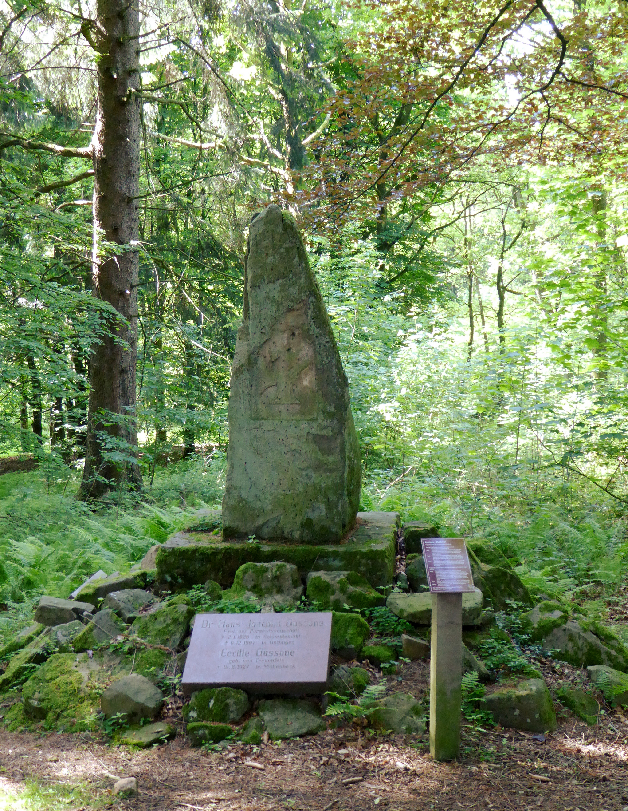 Gussone-Denkmal östlich von Neuhaus im Solling, Stadt Holzminden, Niedersachsen. Gedenkstätte der Försterfamilie Gussone mit mehreren Gedenktafeln.